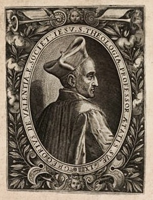 Gregor von Valencia (1549-1603), spanischer Jesuit und Theologe, Porträtstich aus einem seiner Werke, 1603